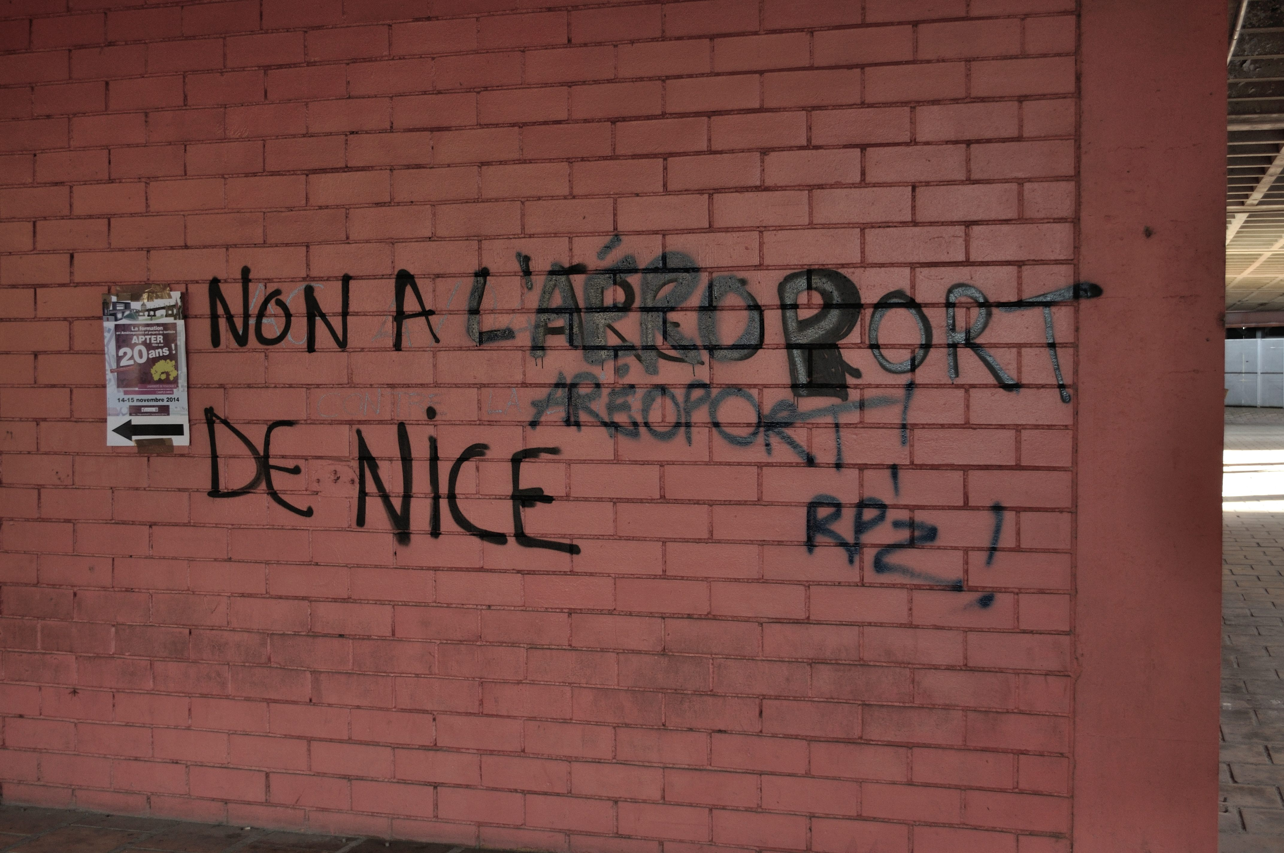 Tag sur un mur pendant le blocage du campus de Toulouse II en novembre 2014. Le texte parodie une réplique du film culte La Cité la peur (1994).